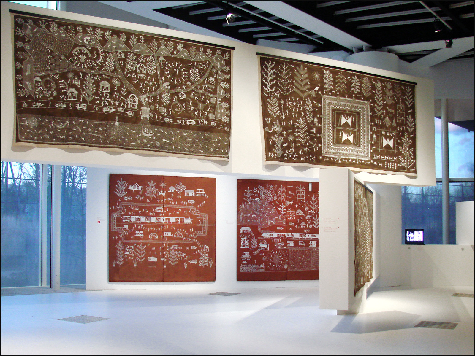 Oeuvres de Jivya Soma Mashe (tribu Warli / Thane district) Image de l'exposition "Autres Maîtres de l'Inde, créations contemporaines des Adivasi " Musée du Quai Branly Paris